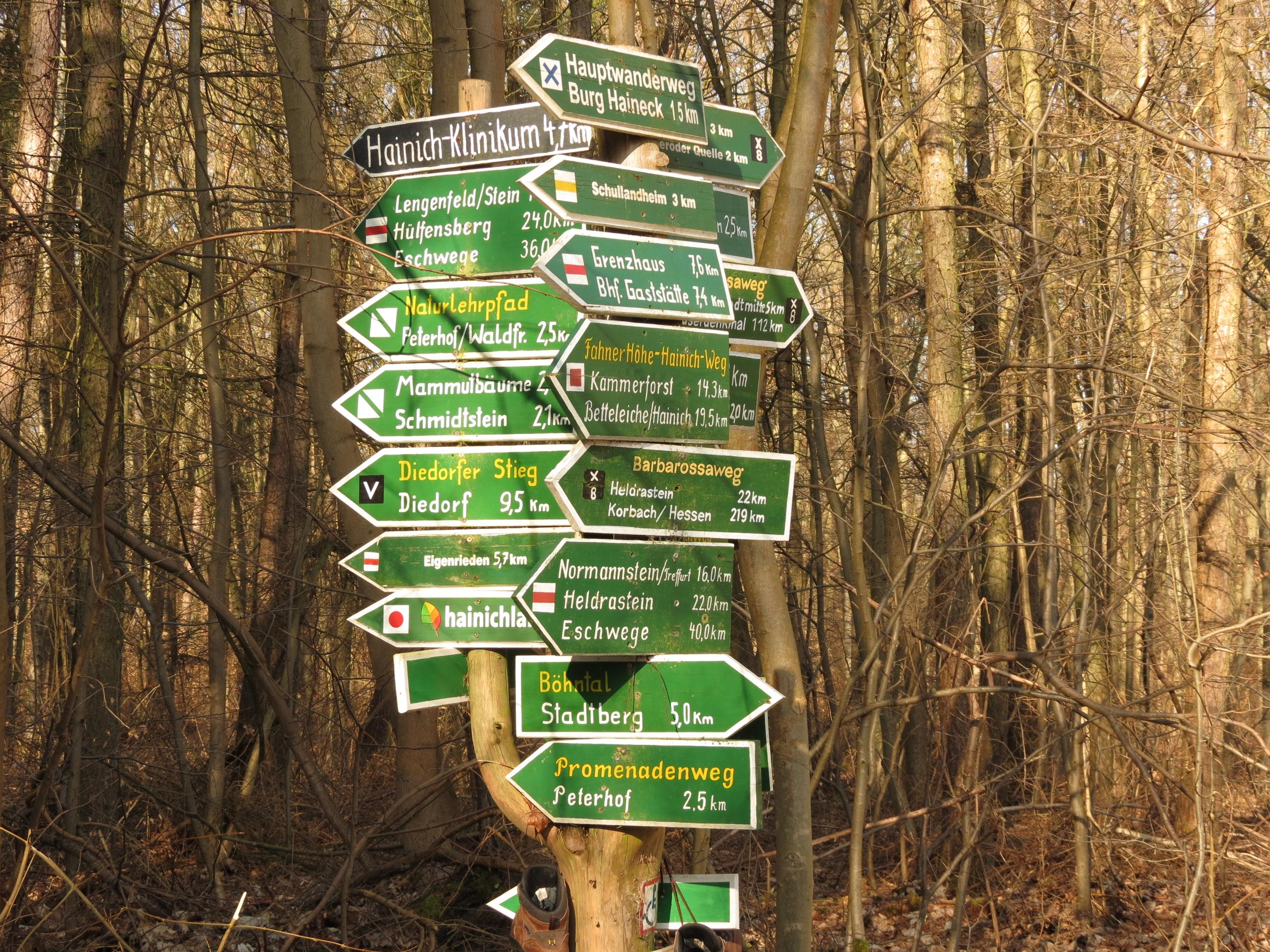 Wegweiser am Weißen Haus (Mühlhäuser Stadtwald).